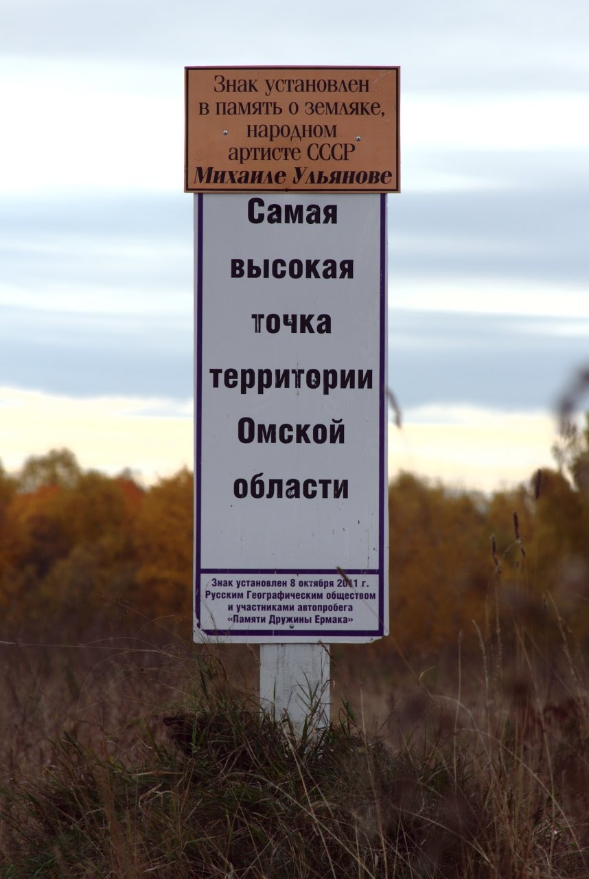 Знак установлен 8 октября 2011 года Русским Географическим обществом и участниками автопробега "Памяти Дружины Ермака"